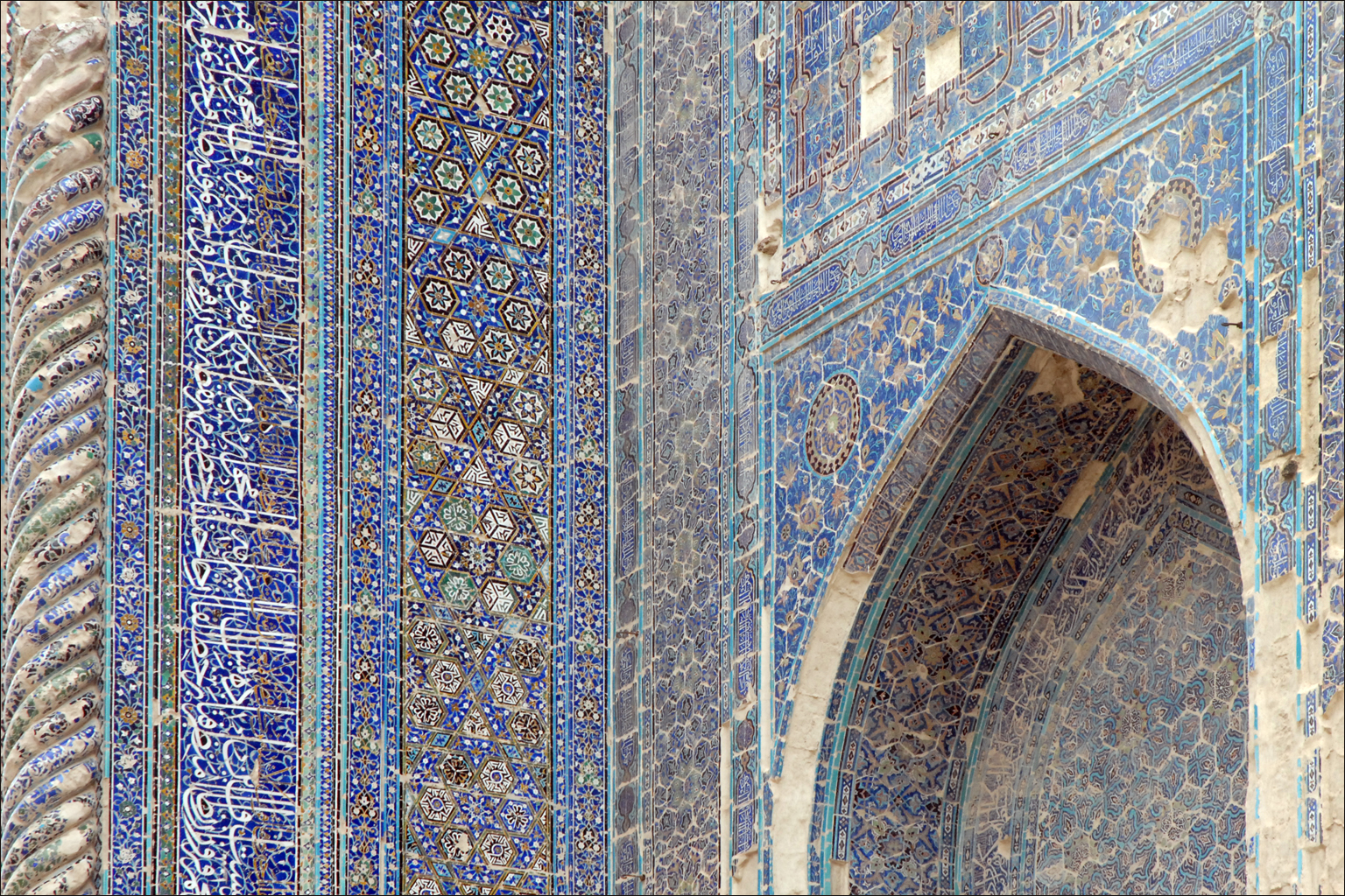 Décors du portail du palais Ak-Saray de Tamerlan Le palais Ak Saray, qui signifie le palais grandiose (blanc, noble), a été construit entre 1380 et 1396 essentiellement par des artisans en esclavage venant des pays soumis par Tamerlan. Il n'en reste que les vestiges des deux tours du portail d'entrée (hautes à l'origine de 50 m) sur lesquelles s'appuyait une voute de 22 m de large. Les chroniques décrivant le palais indiquent qu'il était impressionnant avec des décors raffinés, à base de dorures et de mosaïque dans les tons bleu et vert. __________ Située à 100 Km au sud de Samarcande, Shahrisabz est connu pour être la ville natale, (ancien nom Kesh) de la famille de Tamerlan (Amir Timour). Pour rendre hommage à sa région, il fit construire un mausolée pour son fils où il voulait également être enterré mais également un très vaste palais appelé Ak-Sarai